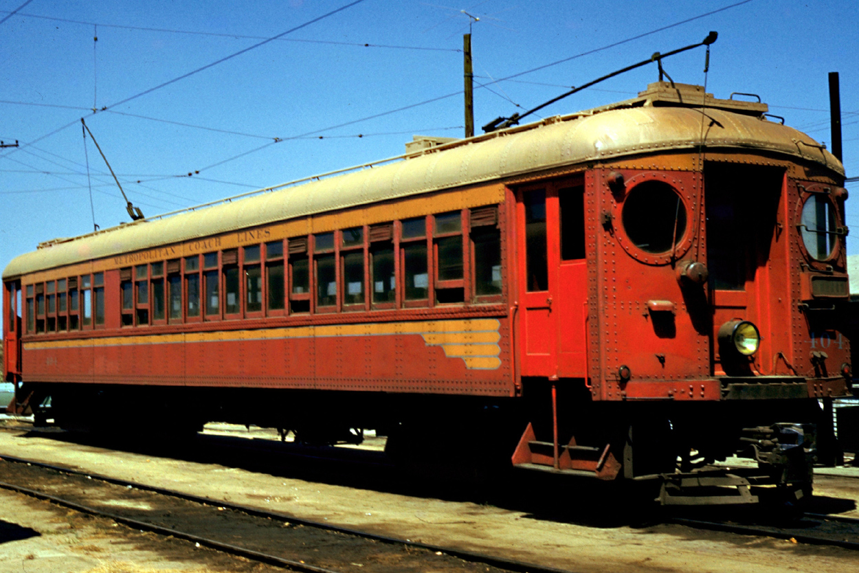 Big Red Car, 1955, Los Angeles Een door mijn vader gemaakte dia, die nu mijn eigendom is, in de jaren 1950. Licensing Categorie:Afbeelding trein